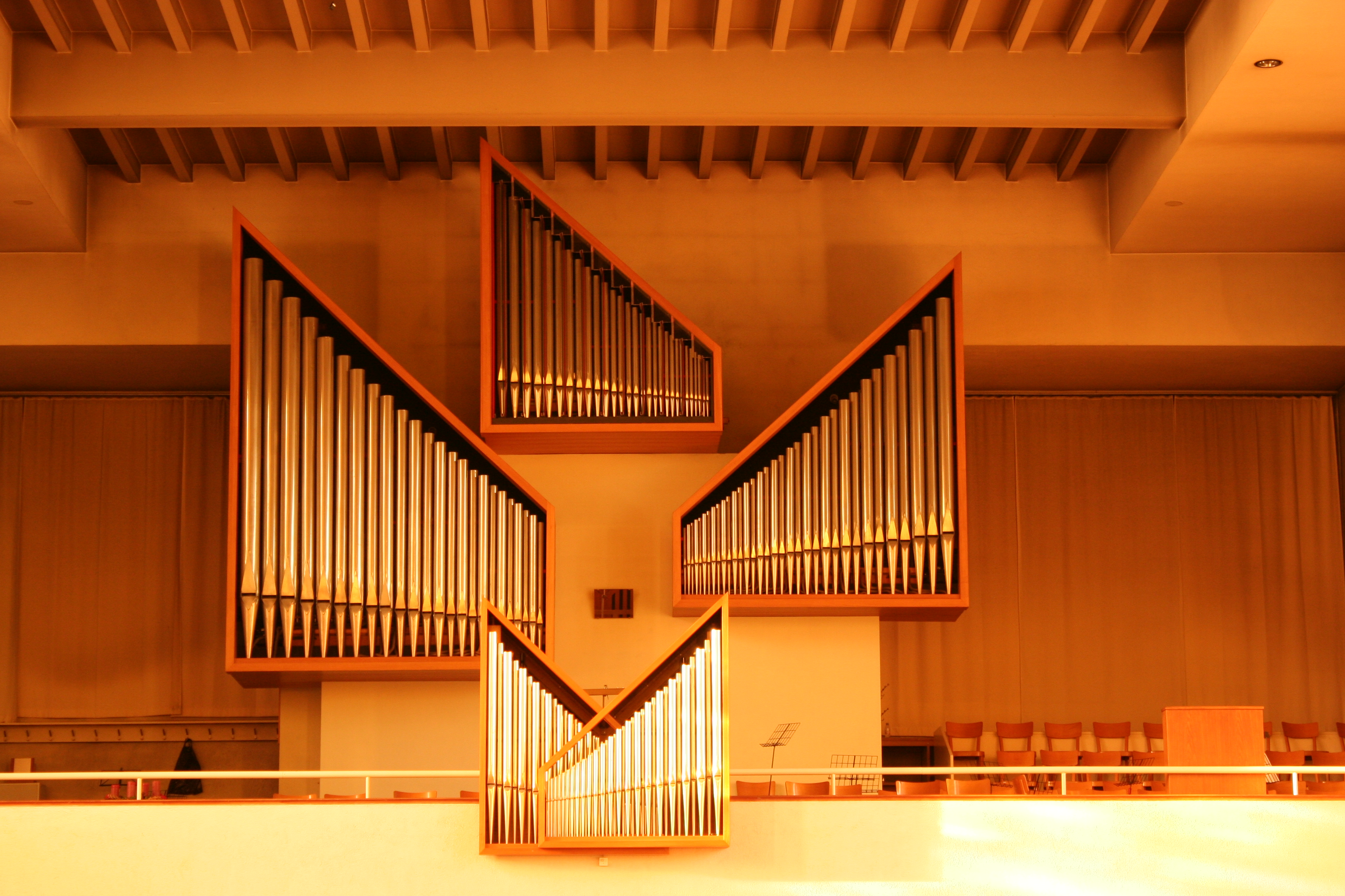 Römisch-katholische Pfarrkirche Herz Jesu Winterthur-Mattenbach